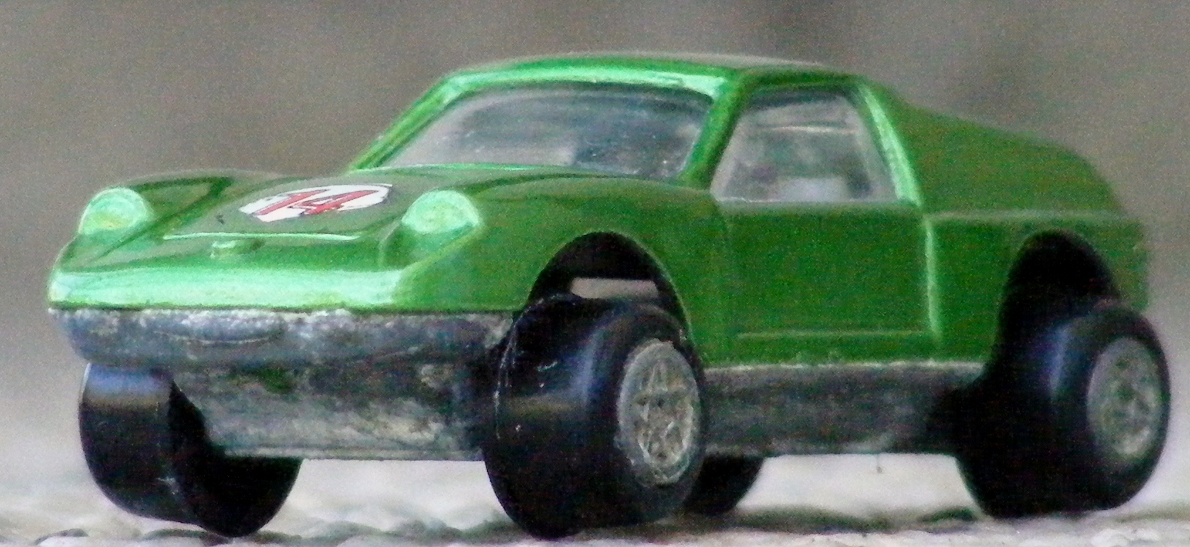 Speedy Velox modelauto van een Lotus Europa